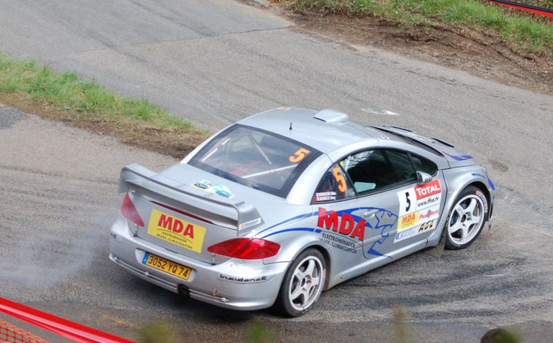 Equipage Snobeck-Mondesir au Rallye Lyon-Charbonnières 2008